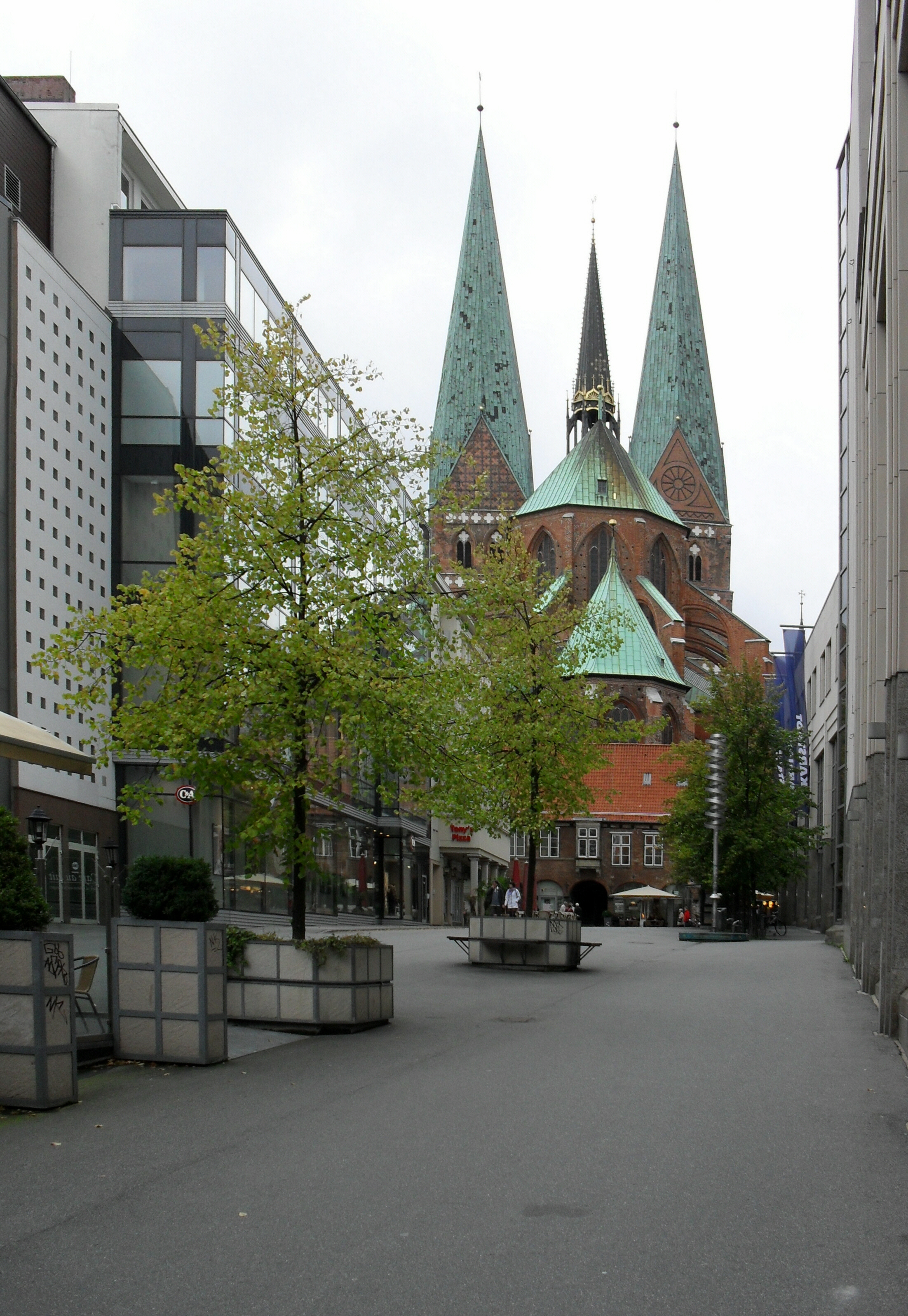 Der Schrangen in Lübeck